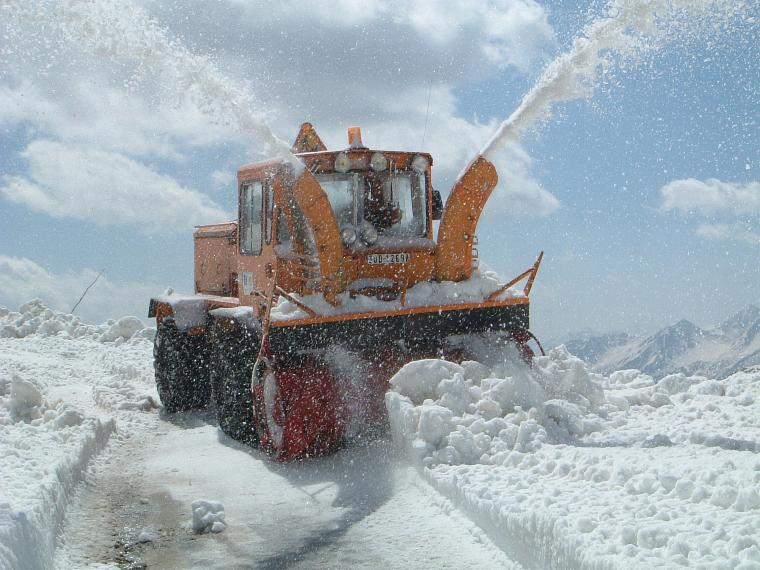 Français cadien: Fraise de déneigement. Col du Galibier, versant Hautes-Alpes, France, 2003.